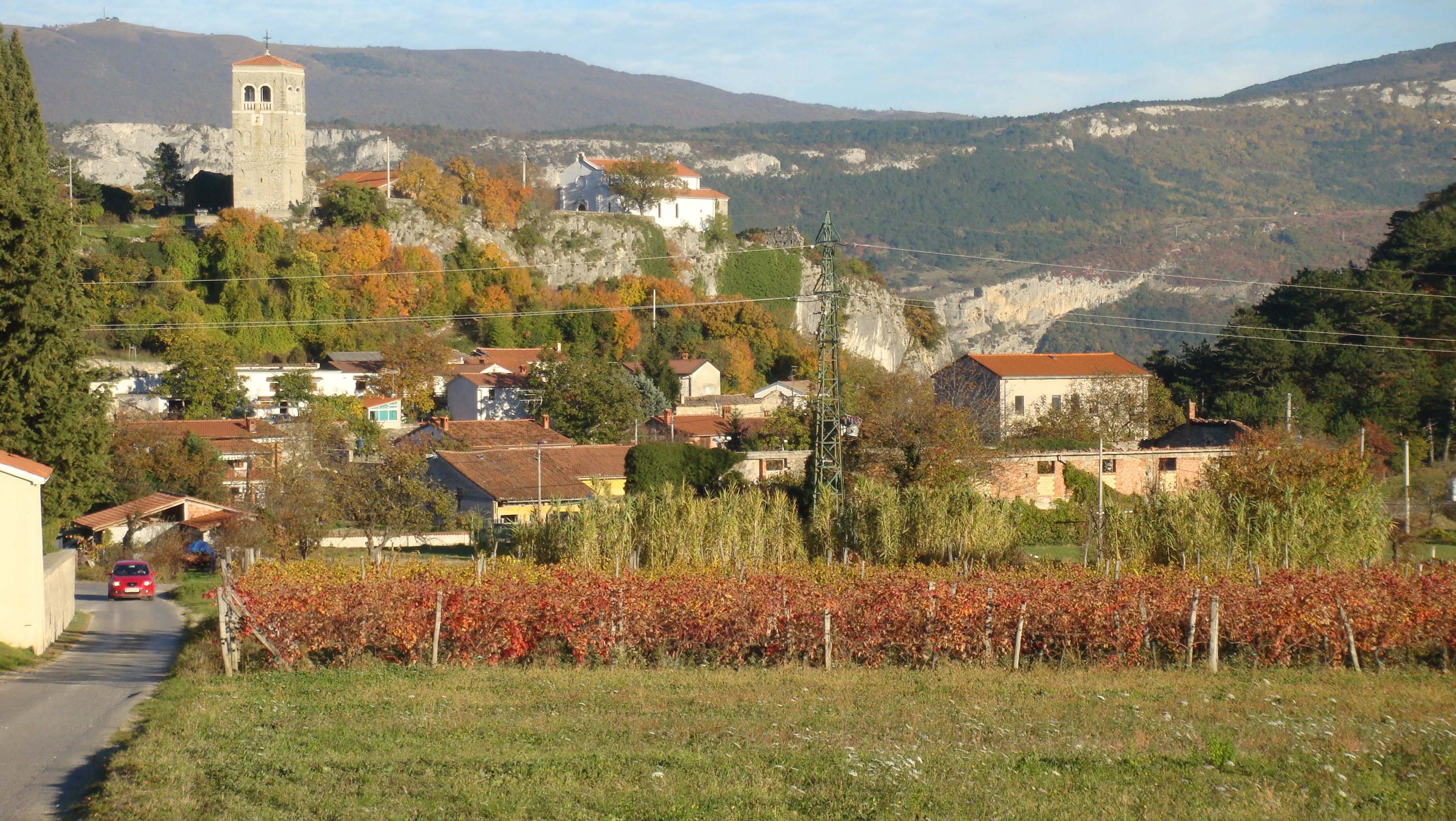 Pogled na vas pod mogočno skalo in zvonik s cerkvijo